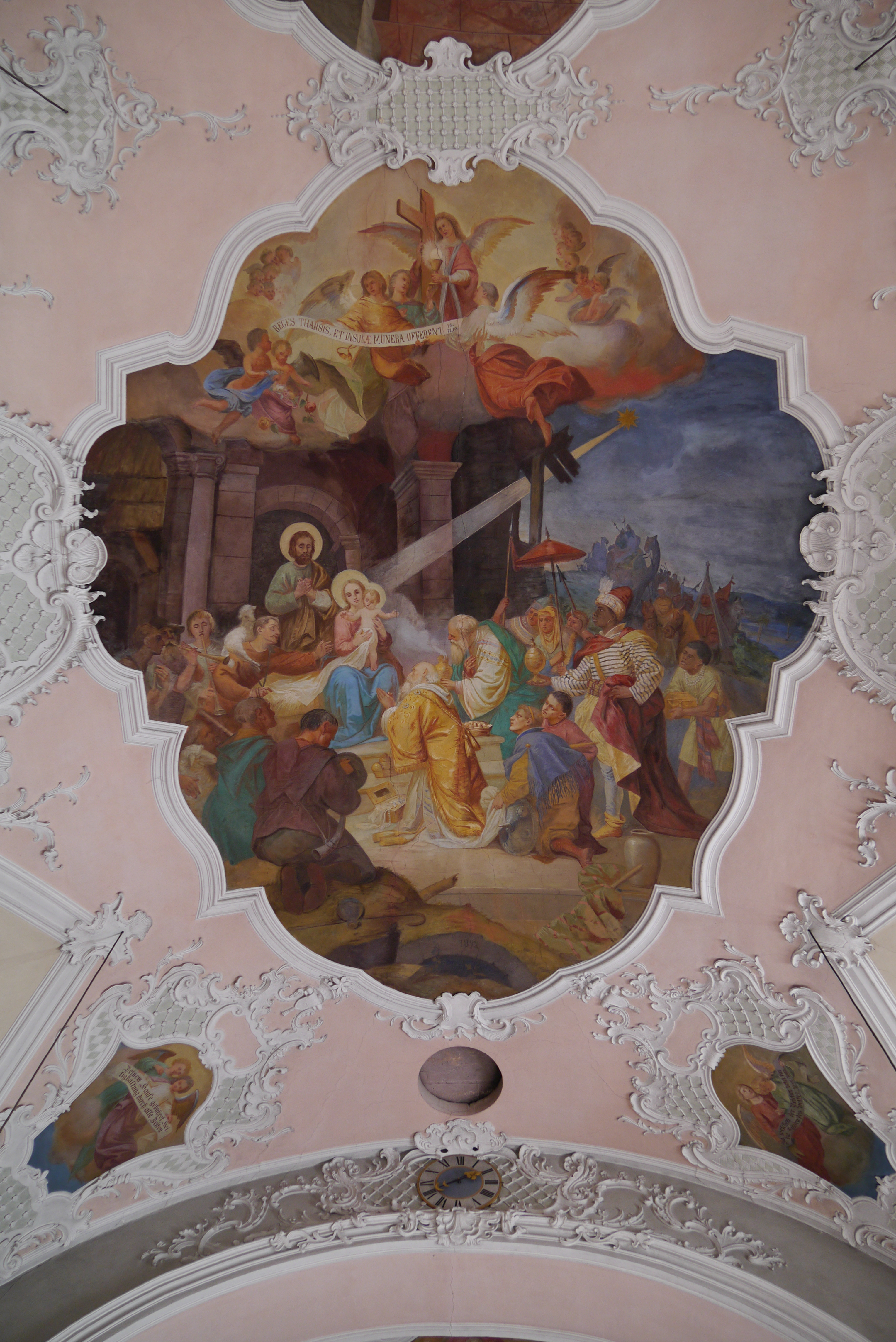 Kath. Pfarrkirche Unsere Liebe Frau Mariä Himmelfahrt, Münster, Deckengemälde